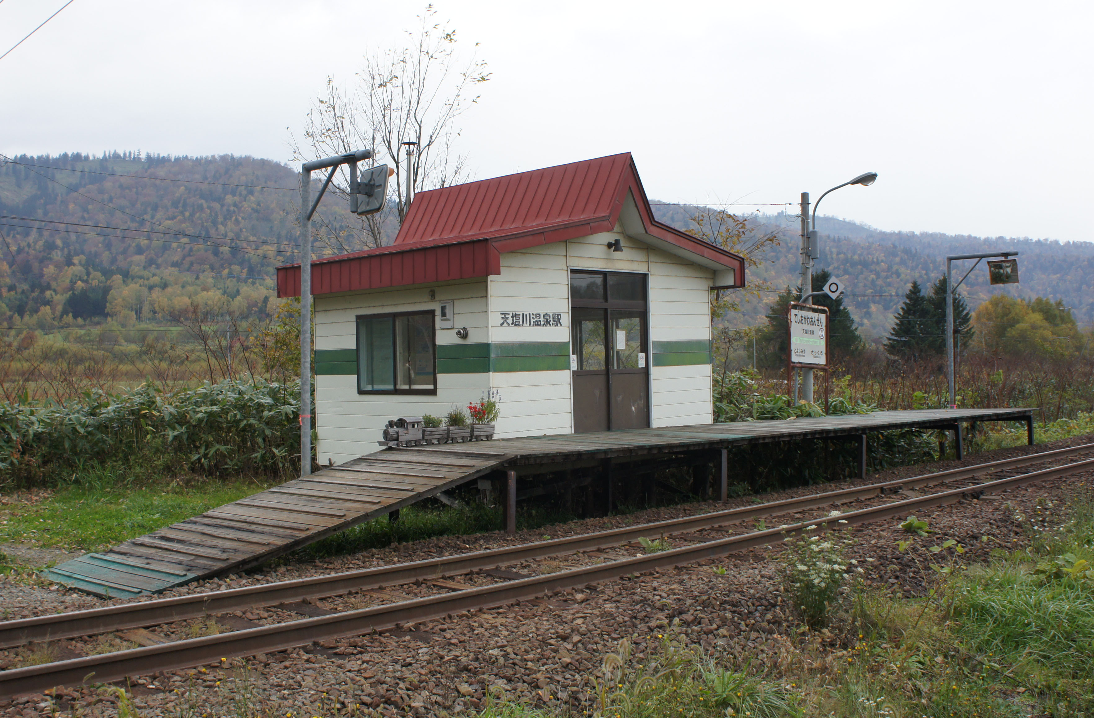 JR宗谷本線・天塩川温泉駅全体 Sony NEX-3